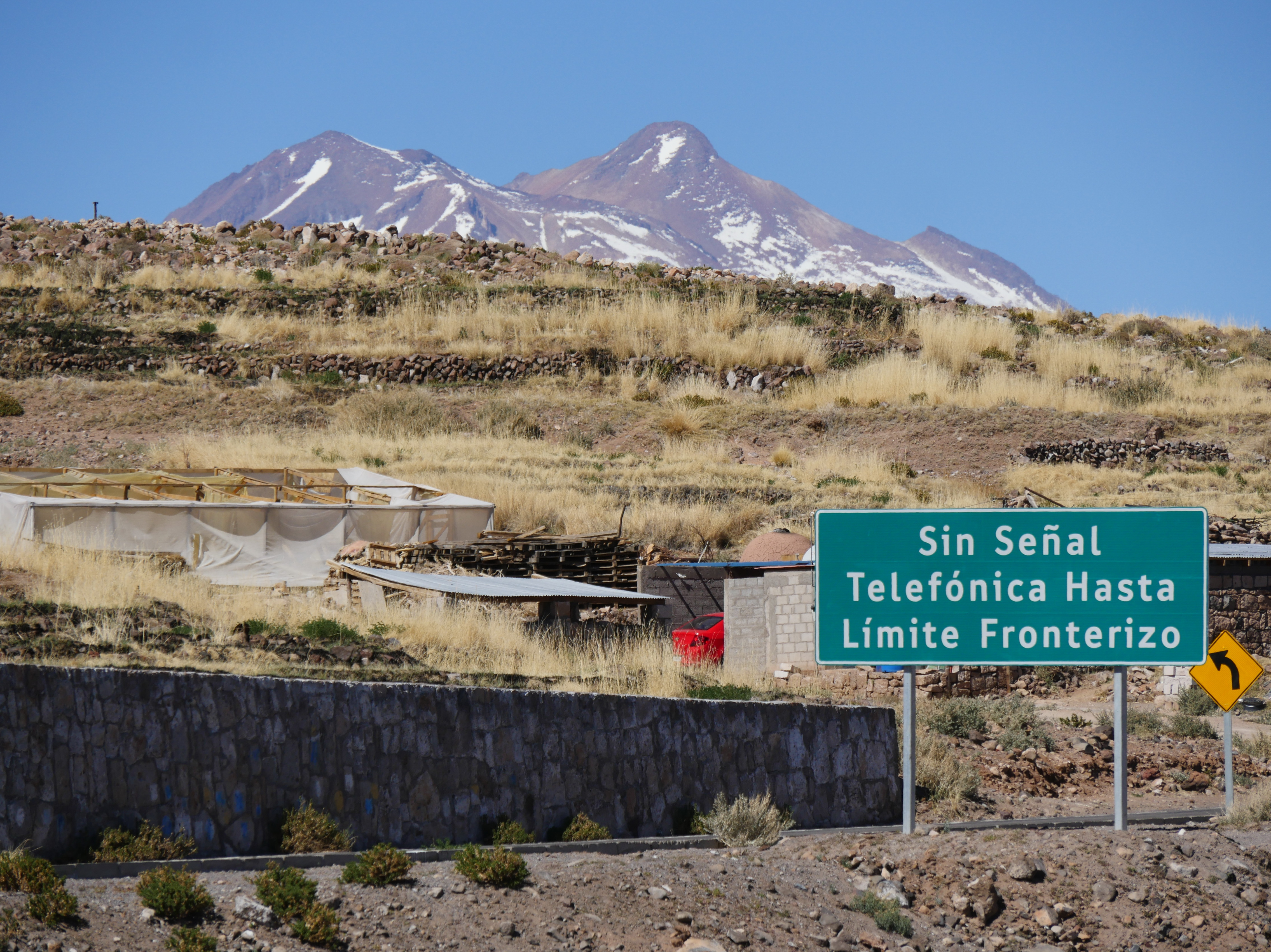 El Miñiques visto desde Socaire. Última oportunidad para hacer una llamada antes de llegar al altiplano.